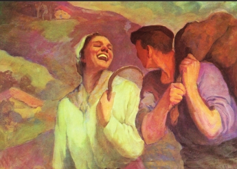 “Piropoa”, Jazinto Olabe